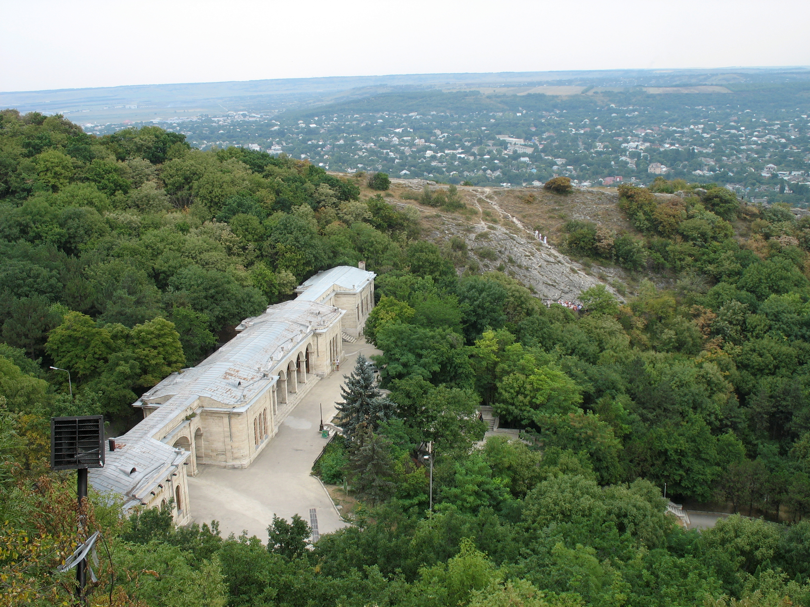 Академическая галерея